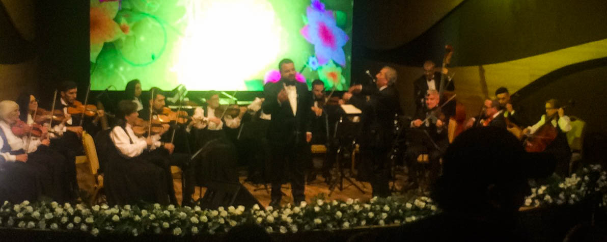 Samir Cəfərovun Gəncə Dövlət Filarmoniyasının Kamera Orkestrı ilə çıxışı